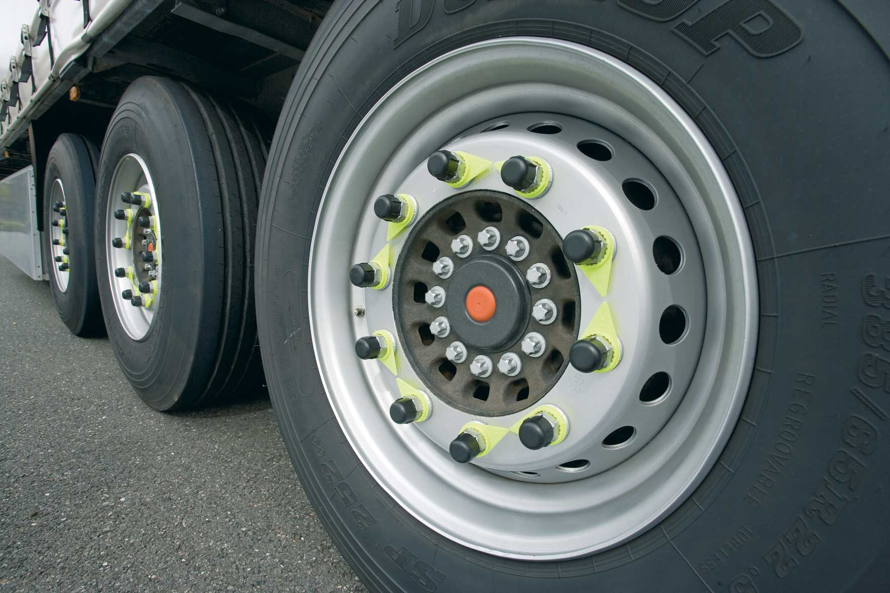 Radmutterindikatoren gibt es in zahlreichen Variationen. Sowohl Fahrer als auch Kontrollbehörden wie die Polizei können auf einen Blick erkennen, ob die Radmuttern gesichert sind.